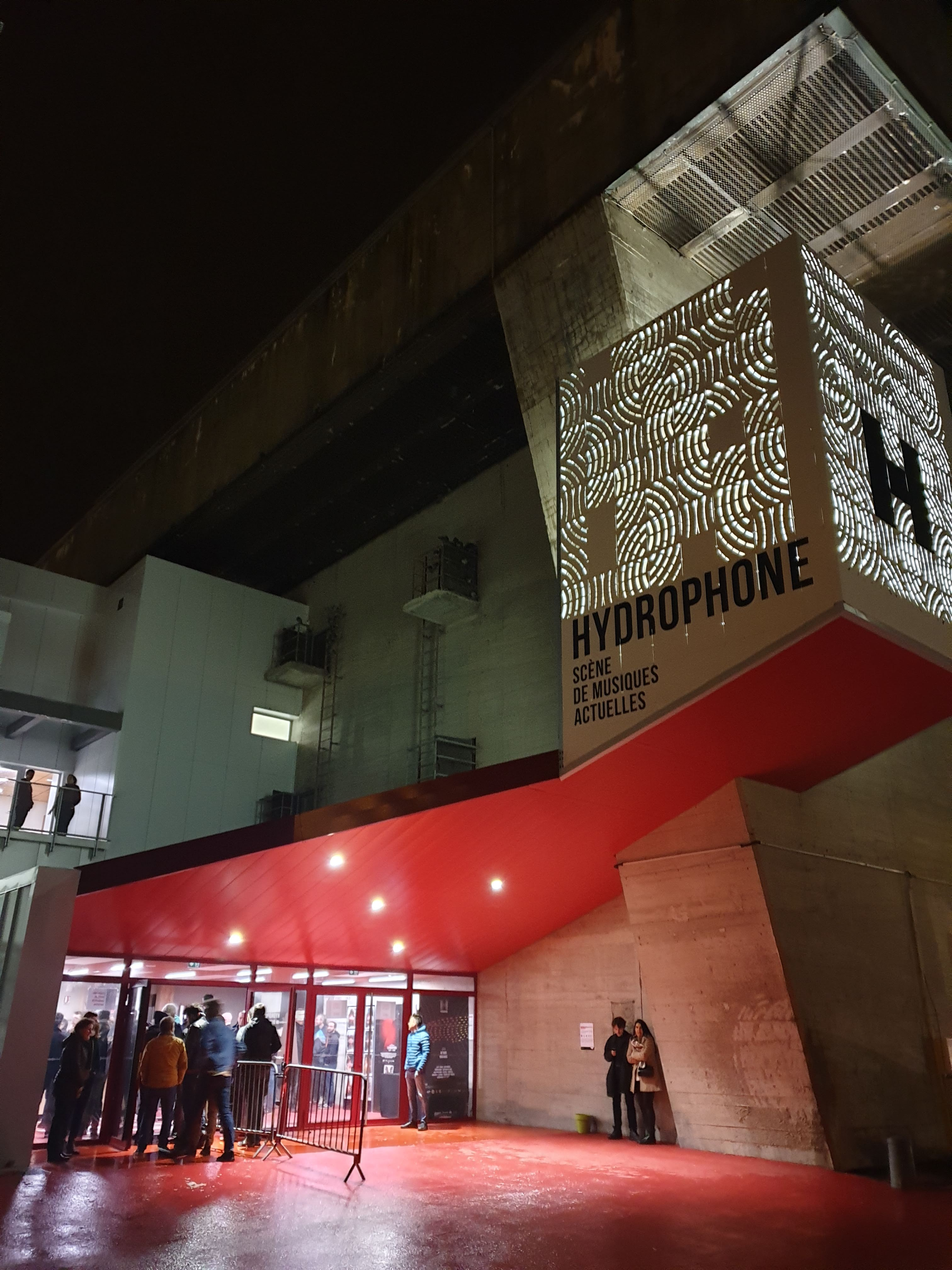 La salle de concert Hydrophone, à Lorient.